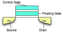 Schnittdarstellung eines Floating Gate Transistors